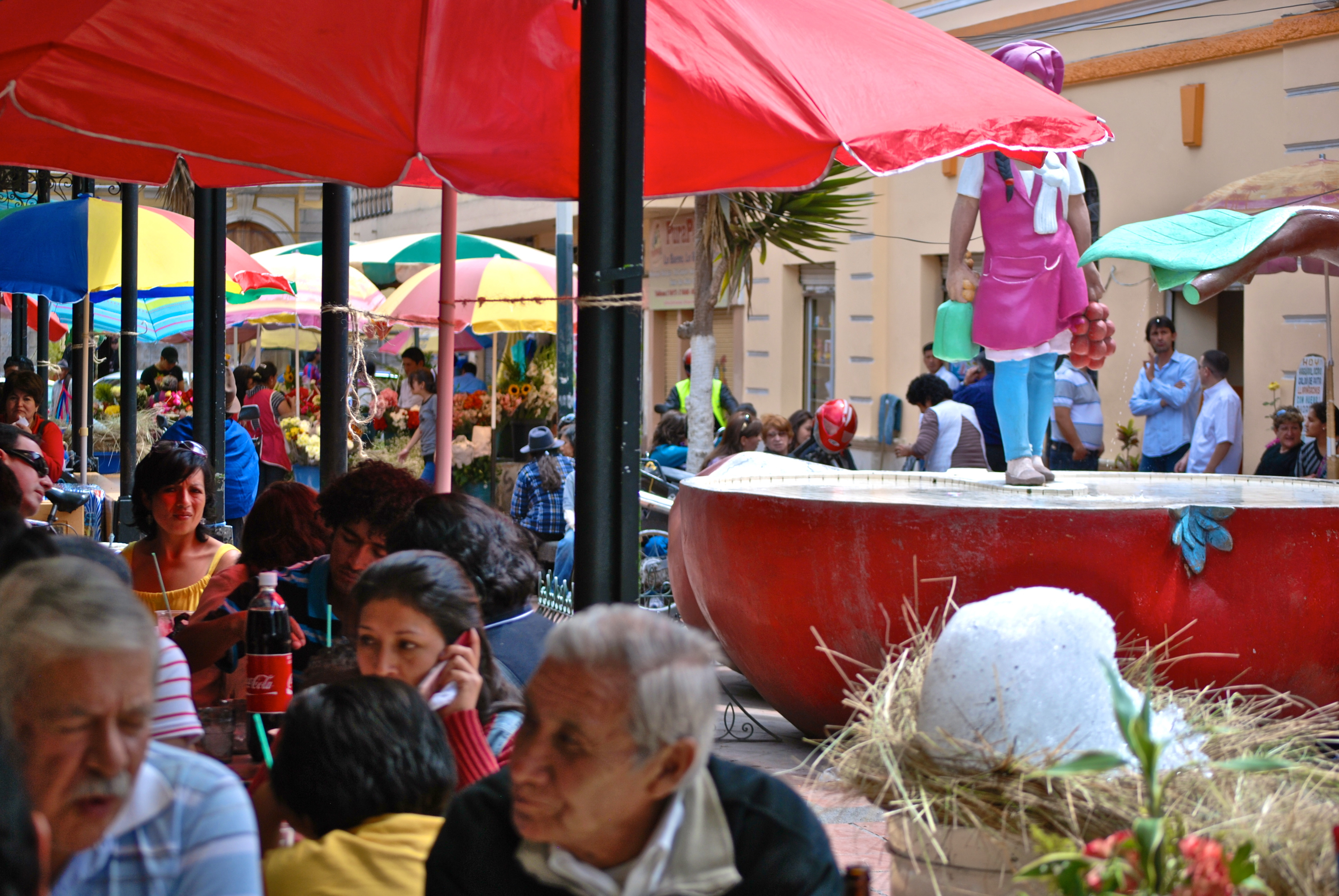 Mercado la Merced, hielo del Chimborazo utilizado para los tradicionales jugos de frutas